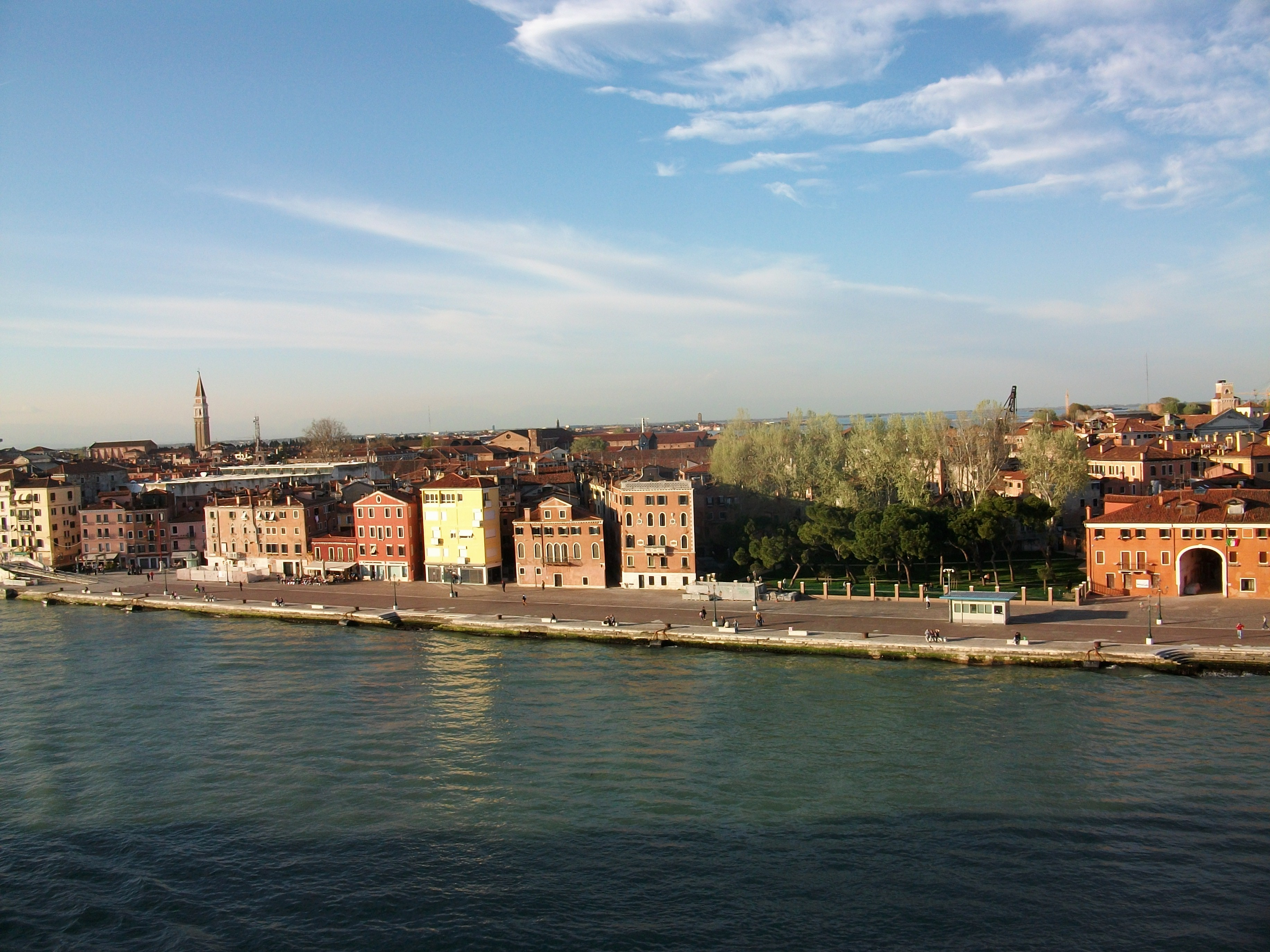 Riva dei Sette Martiri de Venècia.